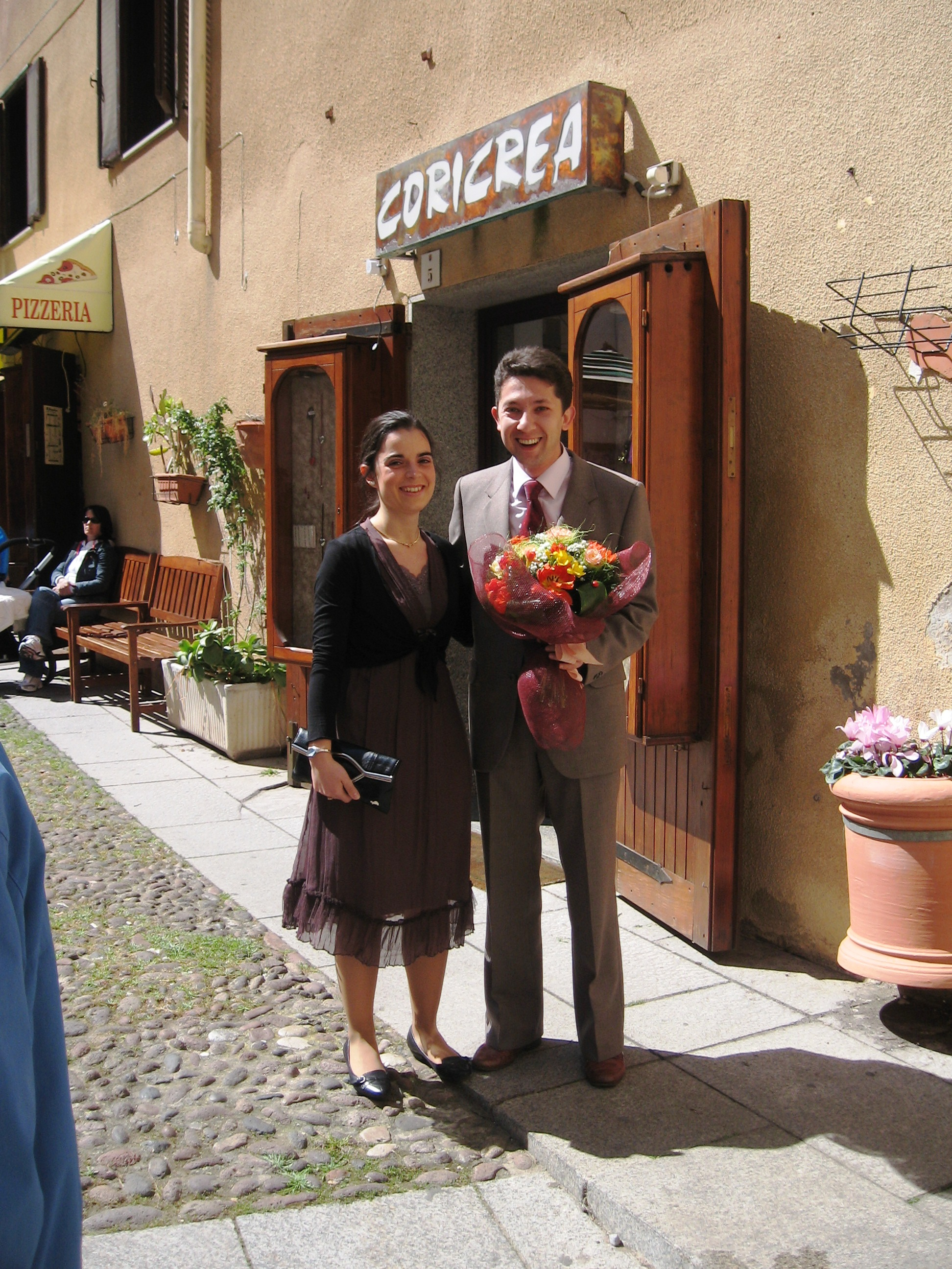 זוג ממתין לנישואין בכניסה לעיריה אלגרו